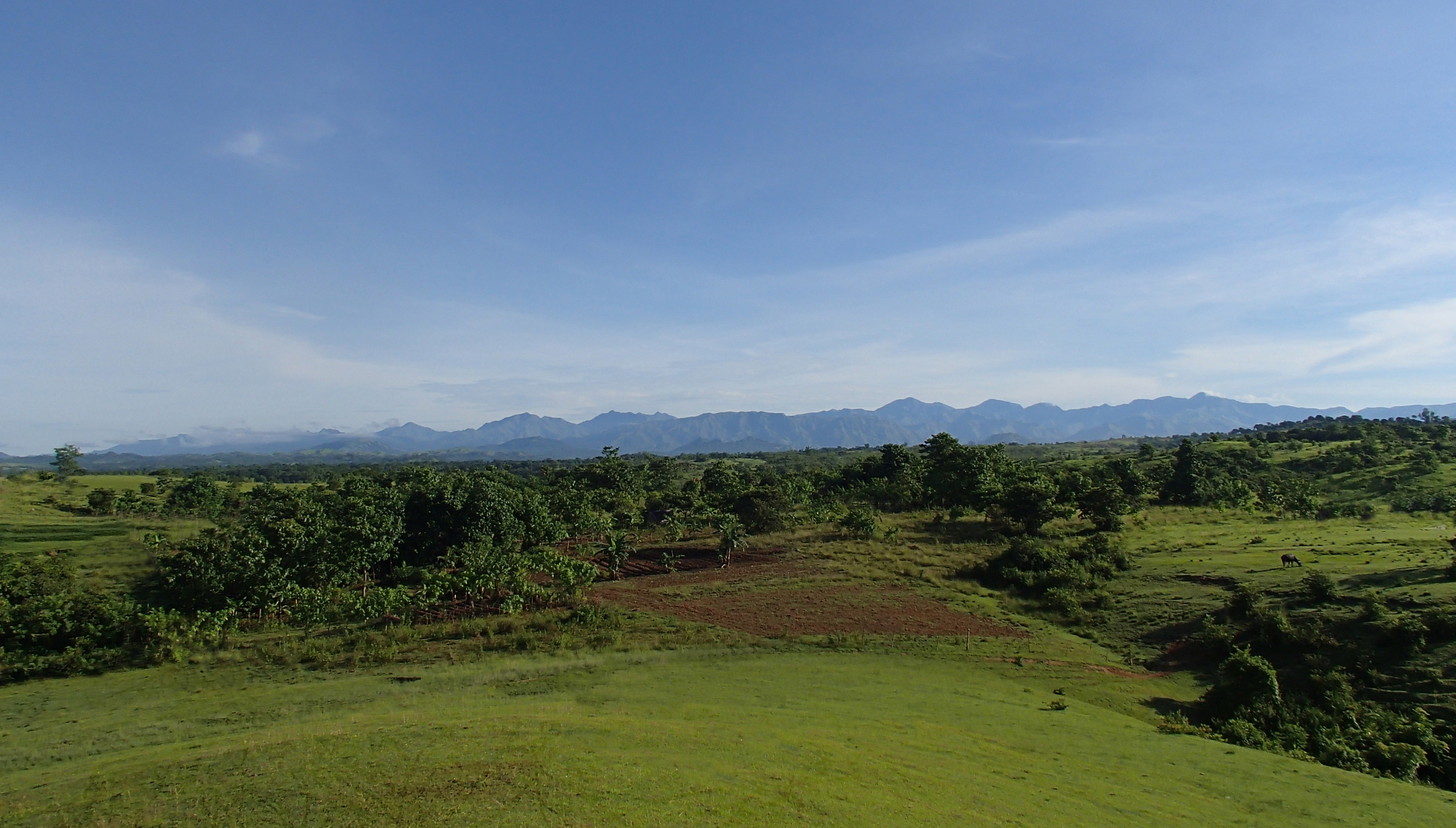 Sitio Mabuhay, Central, San Jose, Occidental Mindoro